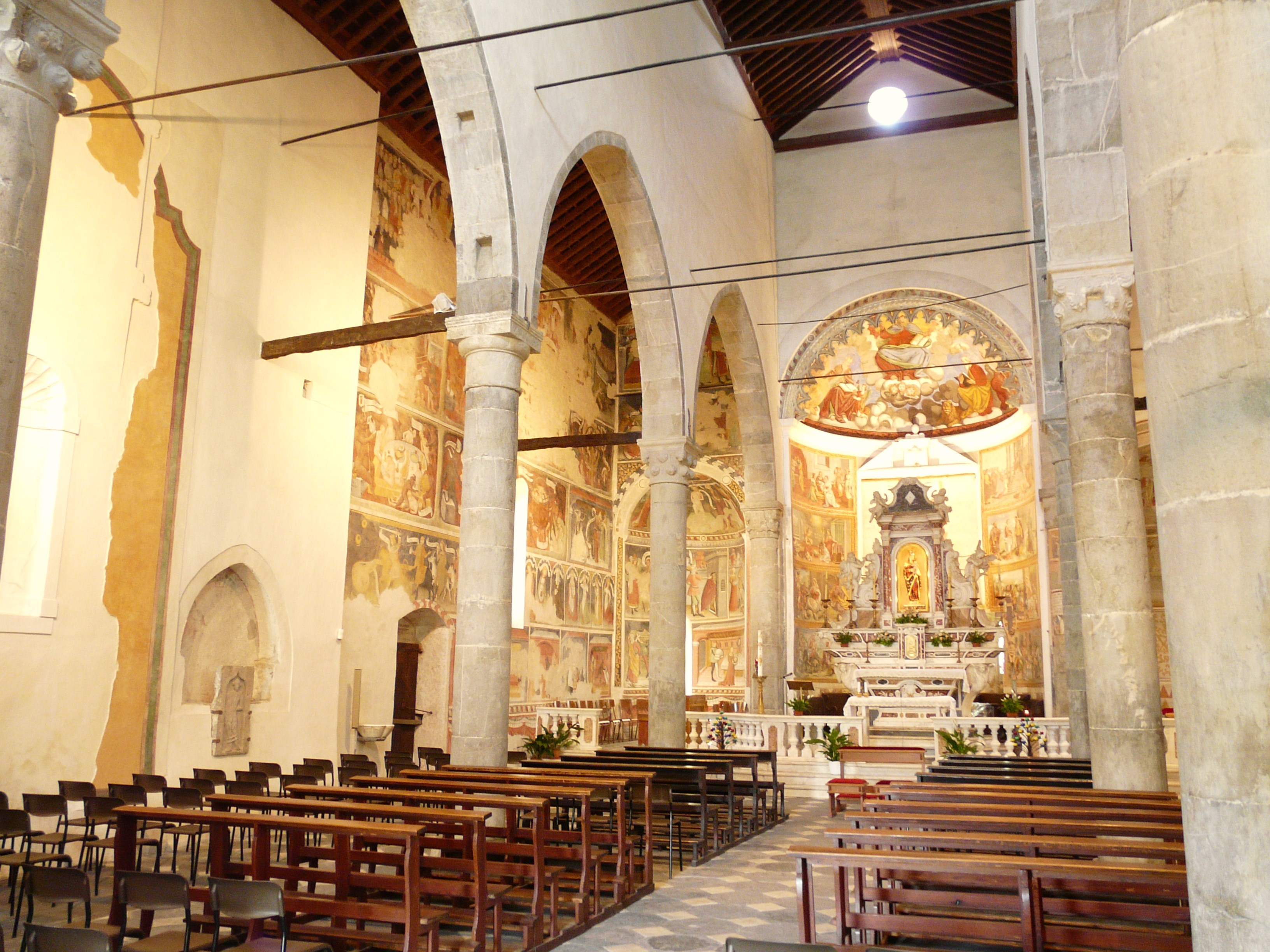 Serie di immagini del santuario di Nostra Signora delle Grazie, frazione di Montegrazie, Comune di Imperia, Liguria, Italia